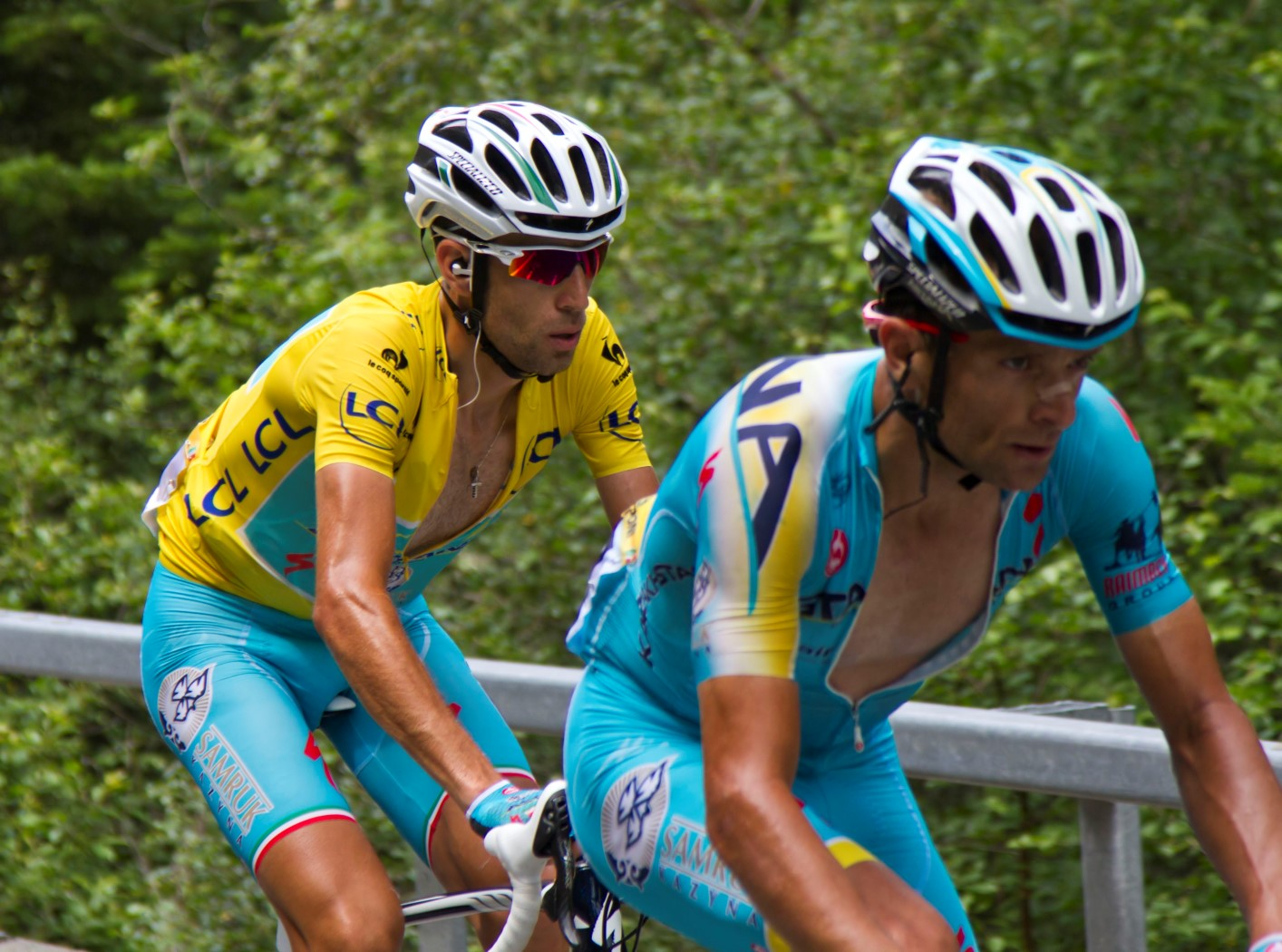 338 nibali en scarponi